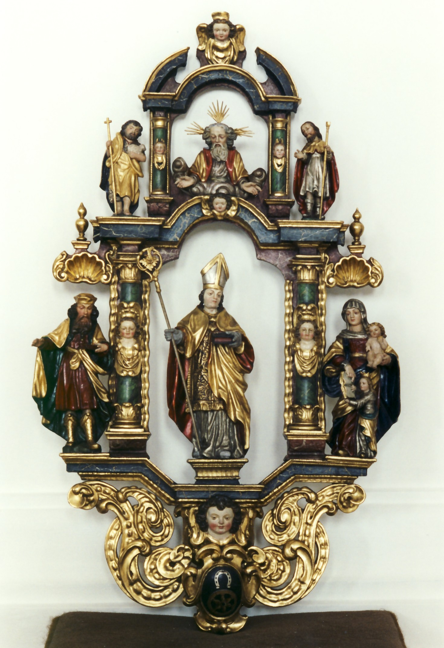 Nikolaus Babel: Zunftzeichen der Hufschmiede und Wagner in der Pfarrkirche Nesselwang